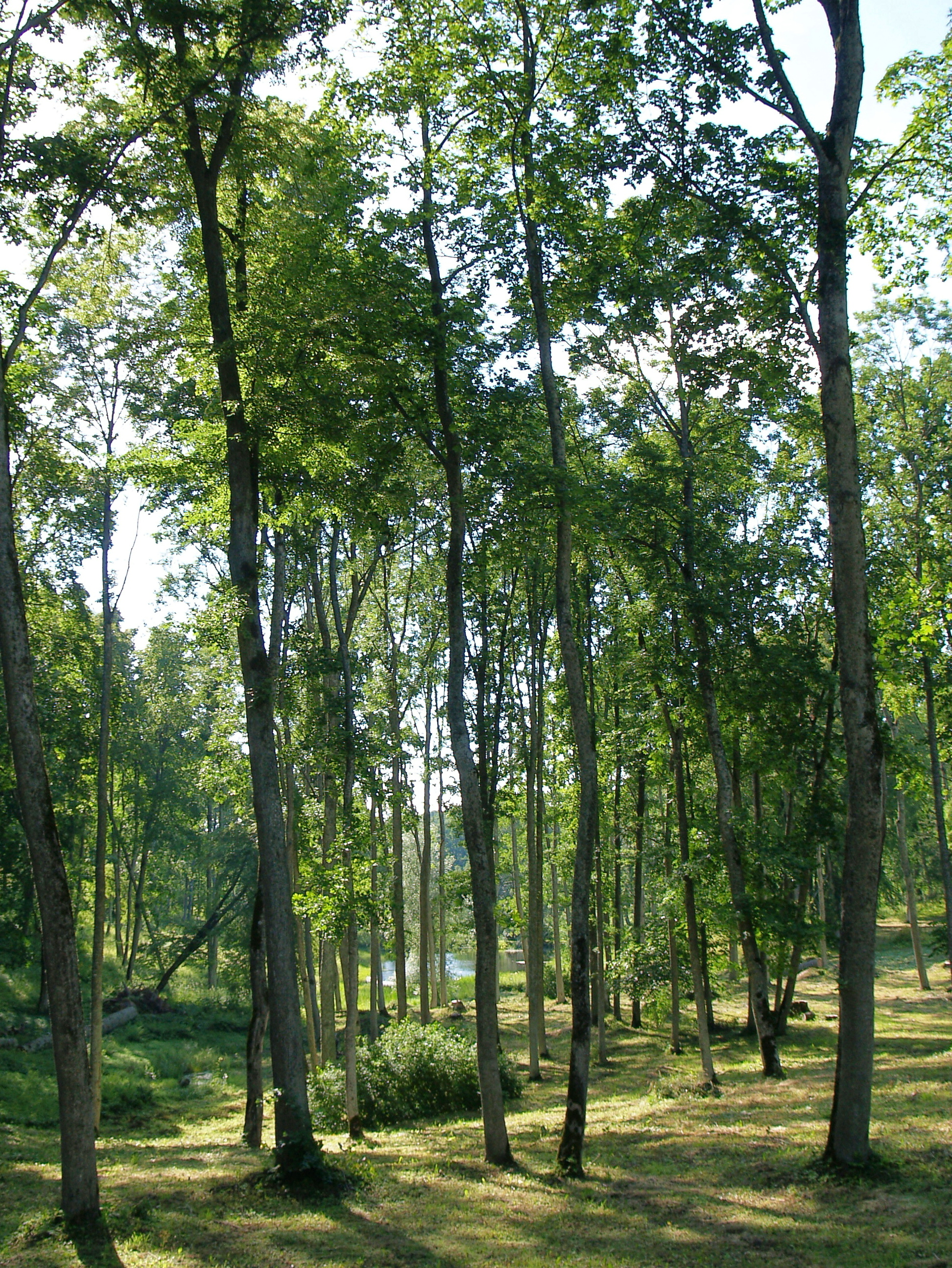 Tebras parks (Tebra park)